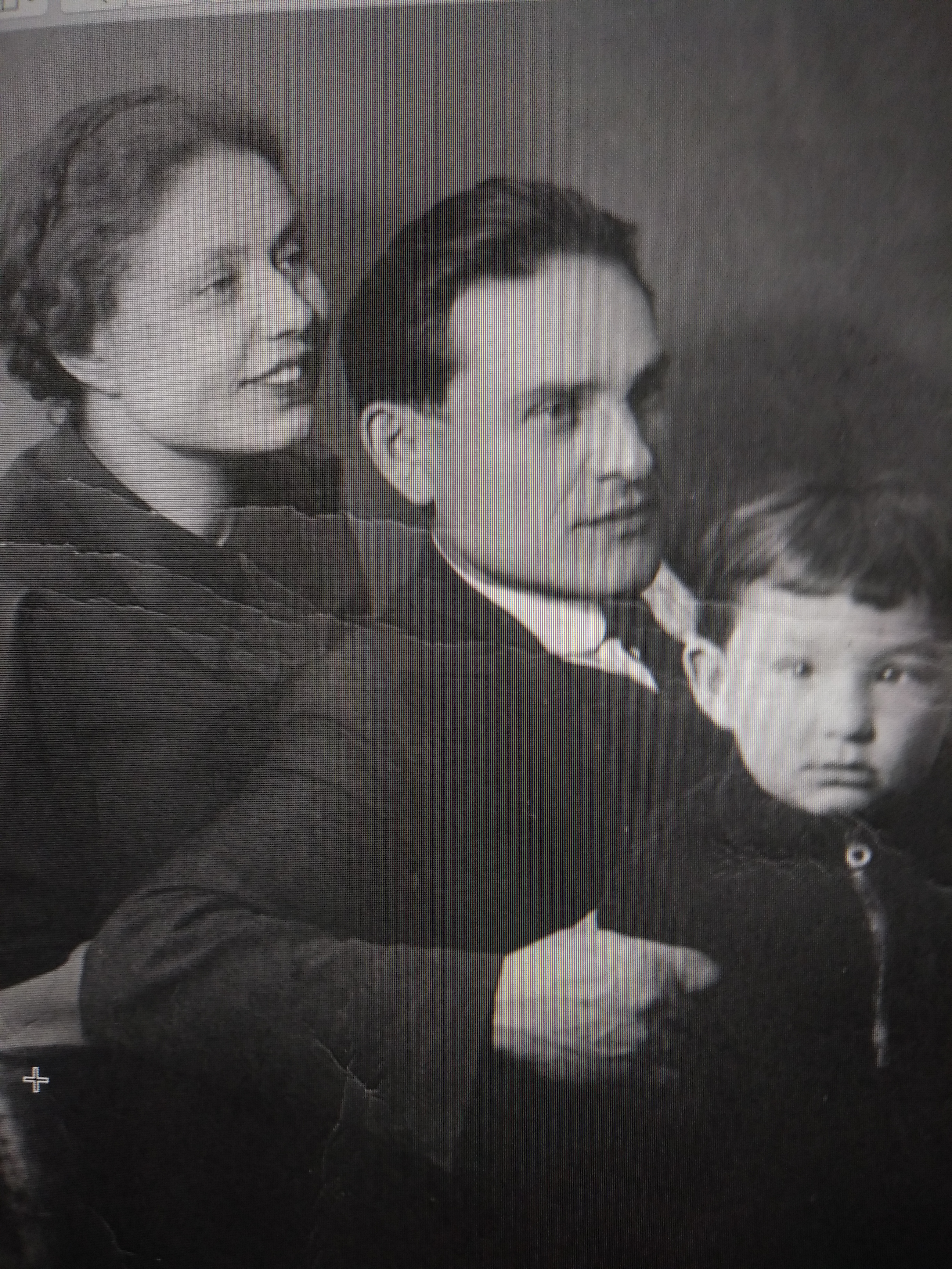 Моин с семьей 1938г: супруга Арончик Ю.С., сын Виктор Моин